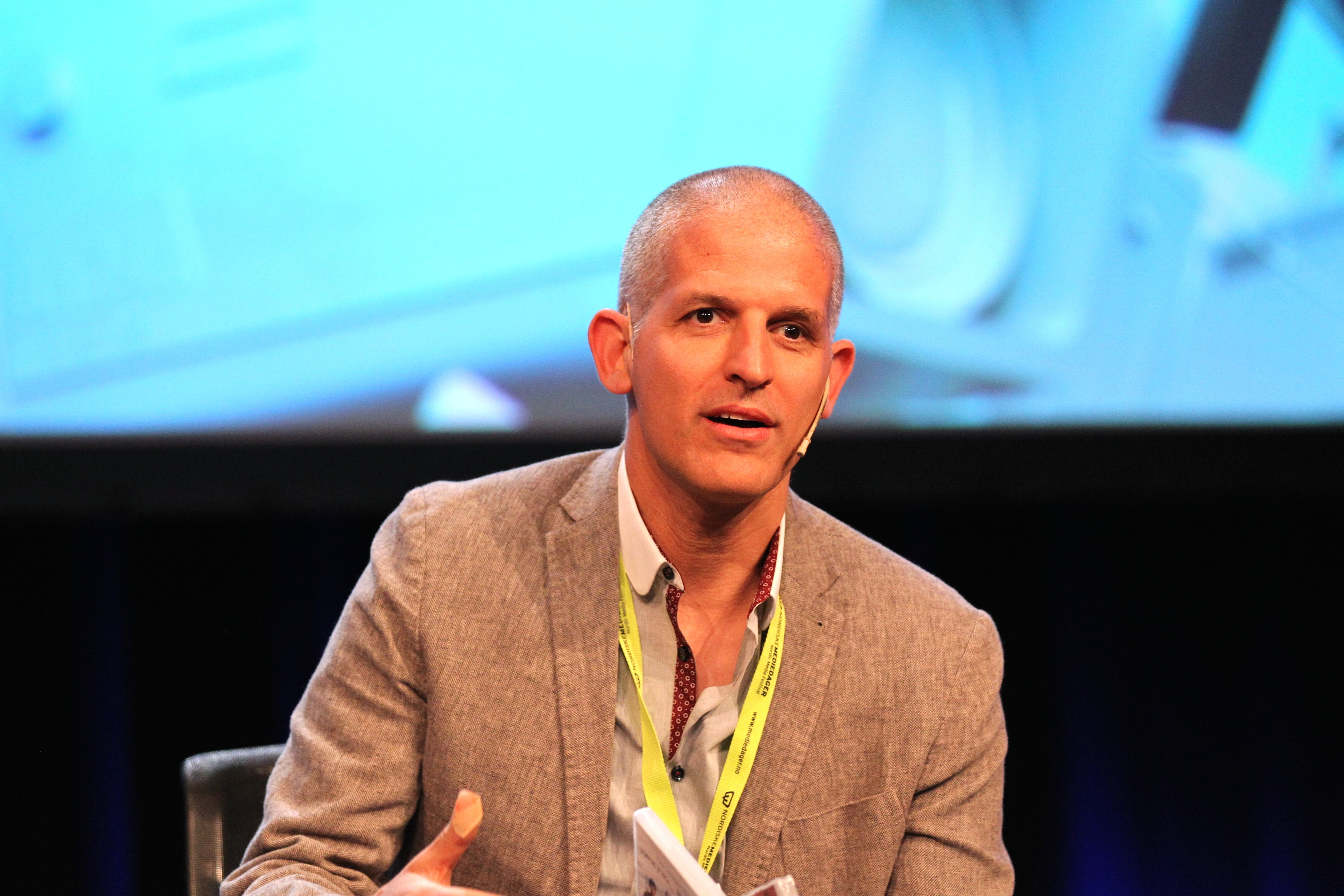 Medvirkende: Reshef Levi og Karni Ziv (Keshet Media Group) Moderator: Asbjørn Slettemark